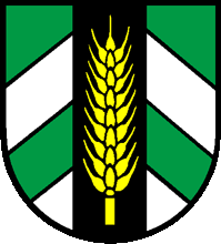 Wappen von Heinrichswil-Winistorf Kanton solothurn Schweiz